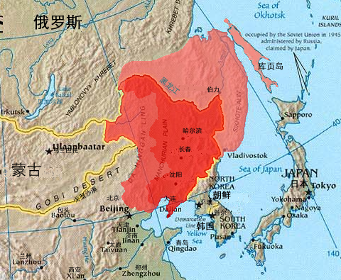 满洲，简体中文版地图。